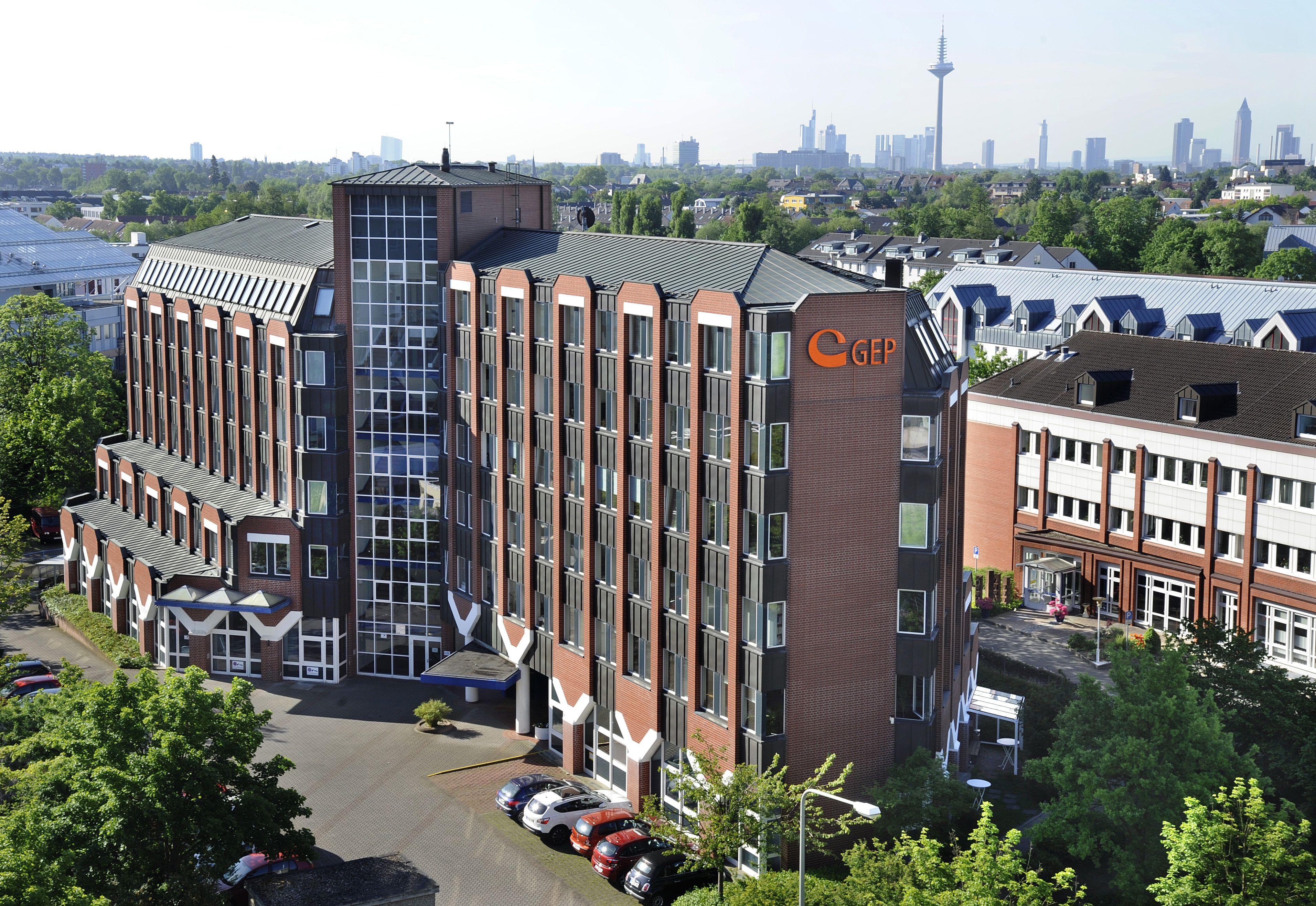 Gebäude des Gemeinschaftswerks der Evangelischen Publizistik (GEP) in Frankfurt am Main